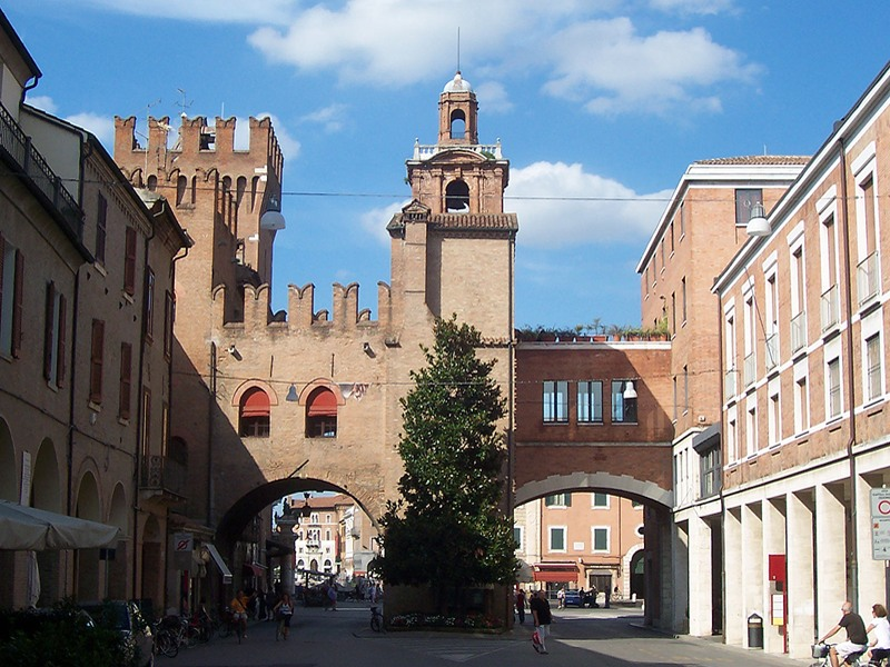 Ferrara - Porta Reno